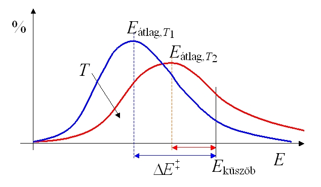 Az aktiválási energia értelmezése